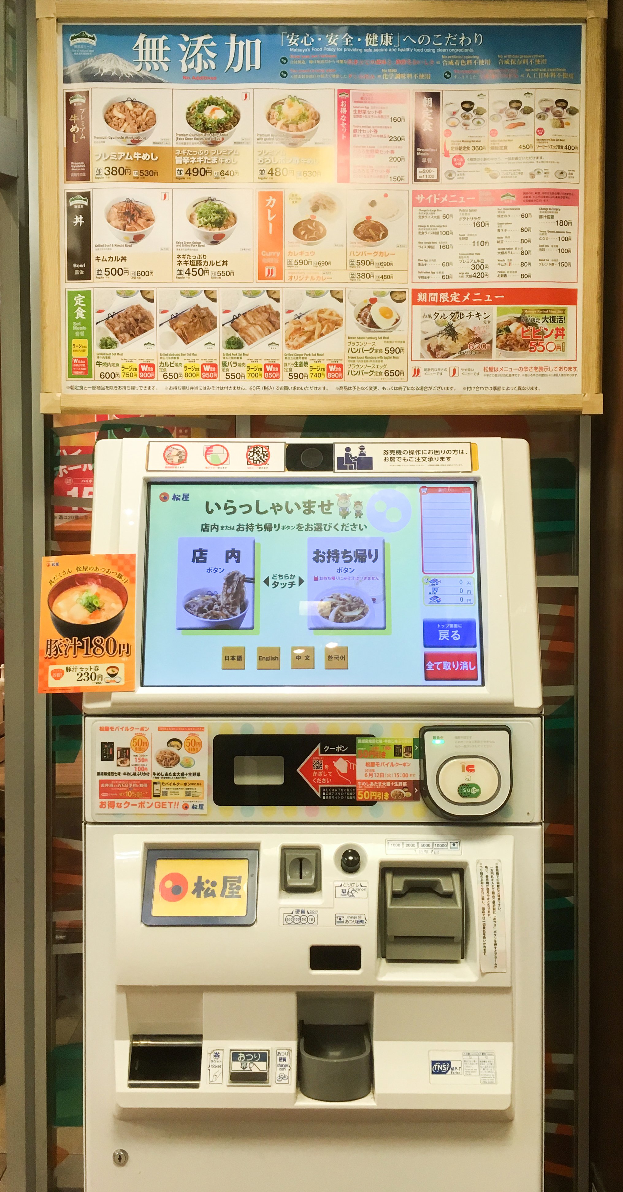 Matsuya Roppongi interior